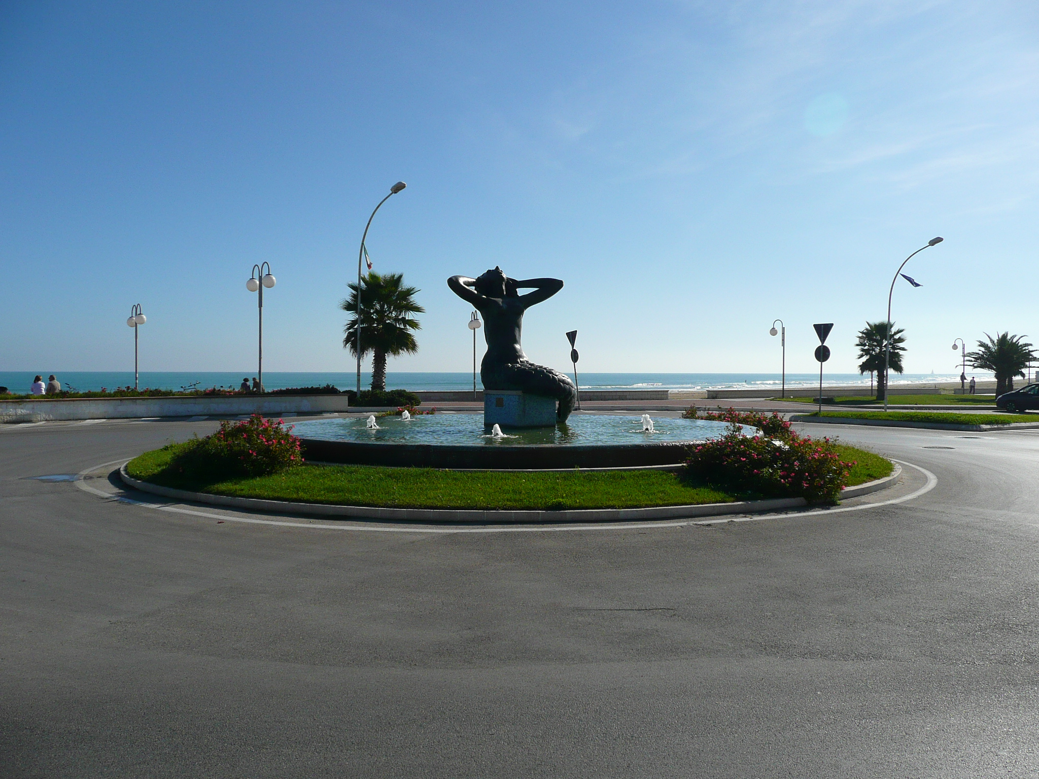 Al 2 novembre sul livello del mare. This is a photo of a monument which is part of cultural heritage of Italy.